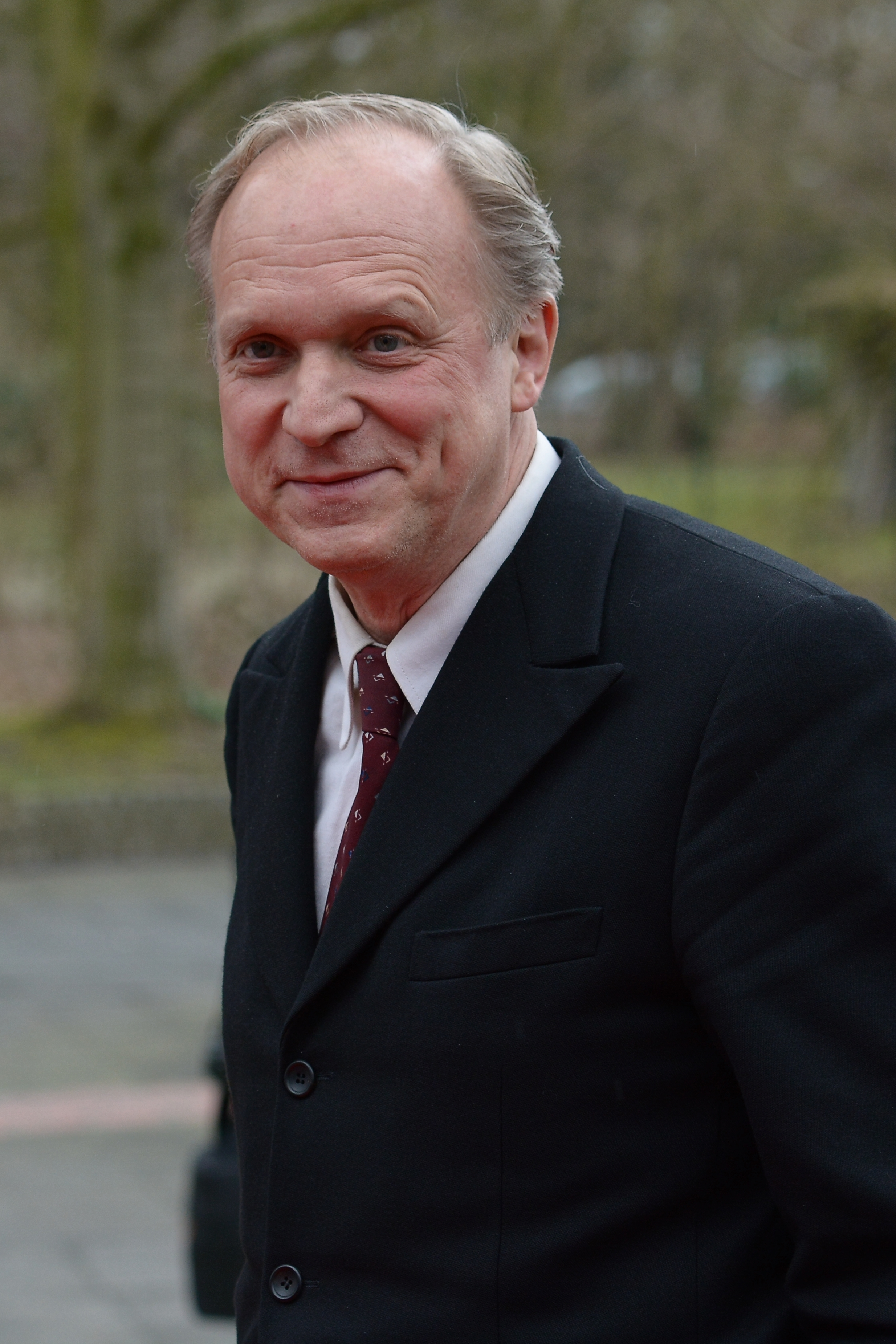 Der deutsche Schauspieler Ulrich Tukur; aufgenommen im Rahmen der Verleihung des Grimme-Preises 2015.